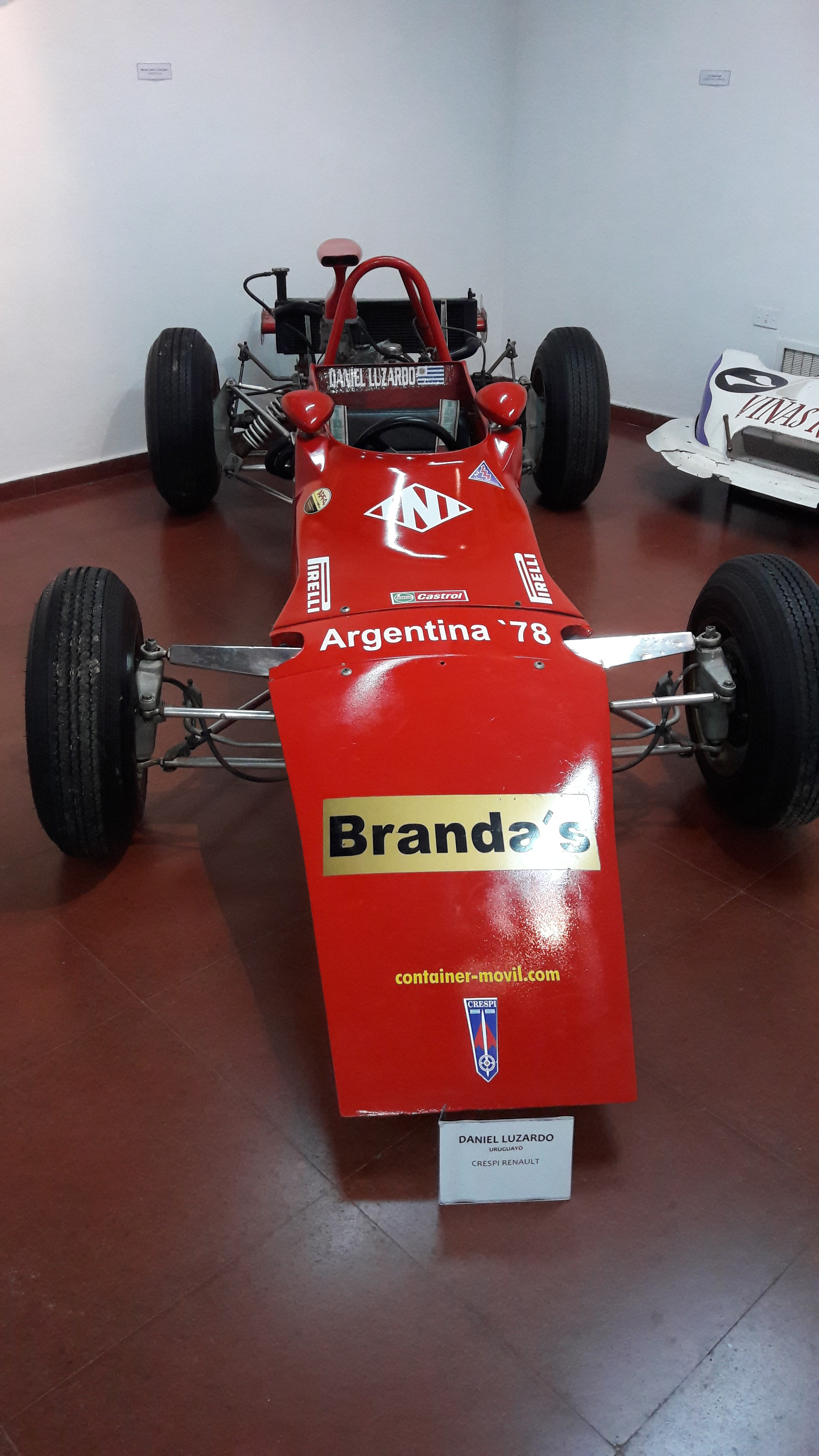 Crespi Renault - Daniel Luzardo. Expo Autos, Museo de Bellas Artes de Luján